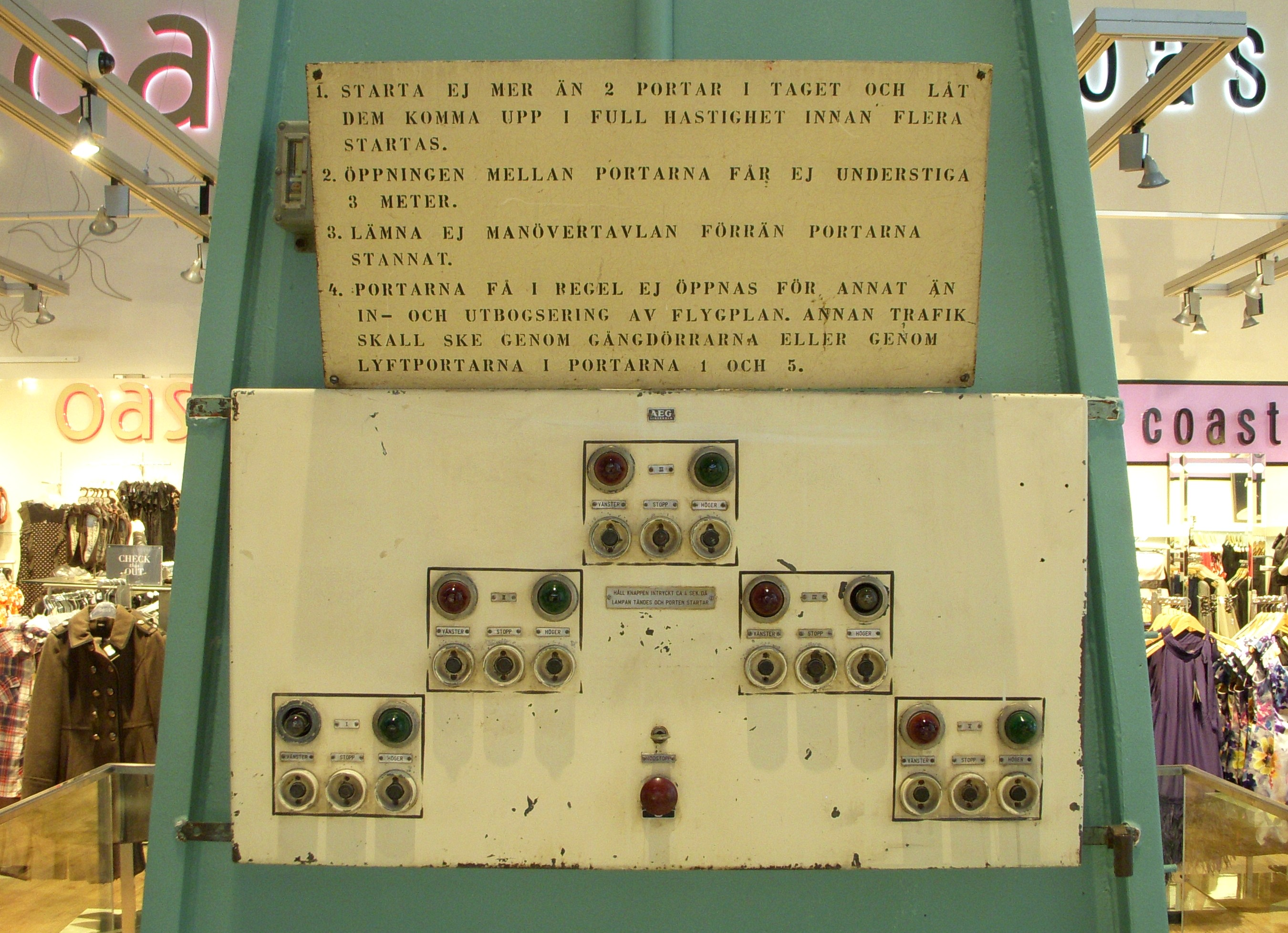 Köpcentra "Bromma Blocks" på Bromma flygplatsområde, kvarvarande manöverpanel till hangarportarna